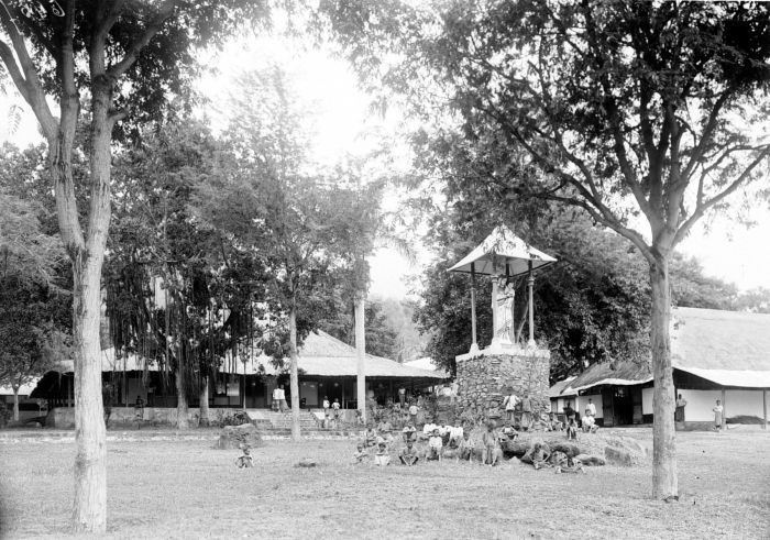 Negatief. Kinderen bij een Mariabeeld op het erf van de pastorie in Larantoeka